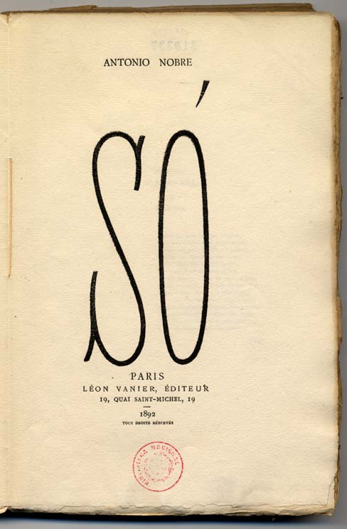 Capa do livro Só, de António Nobre (1867-1900), retirado da Biblioteca Nacional Digital